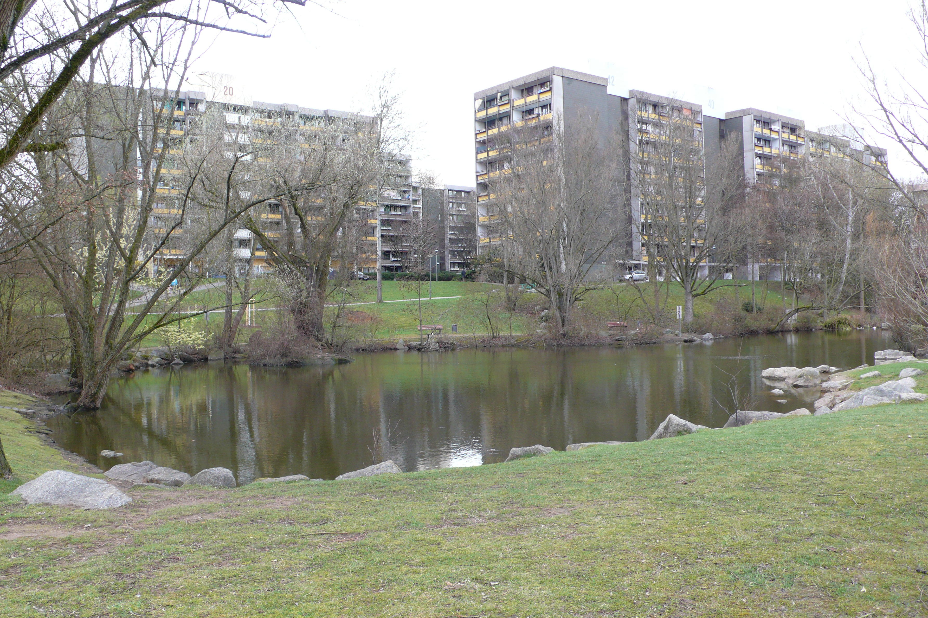 Siedlung Ben-Gurion-Ring, zentraler Grünzug und Teich